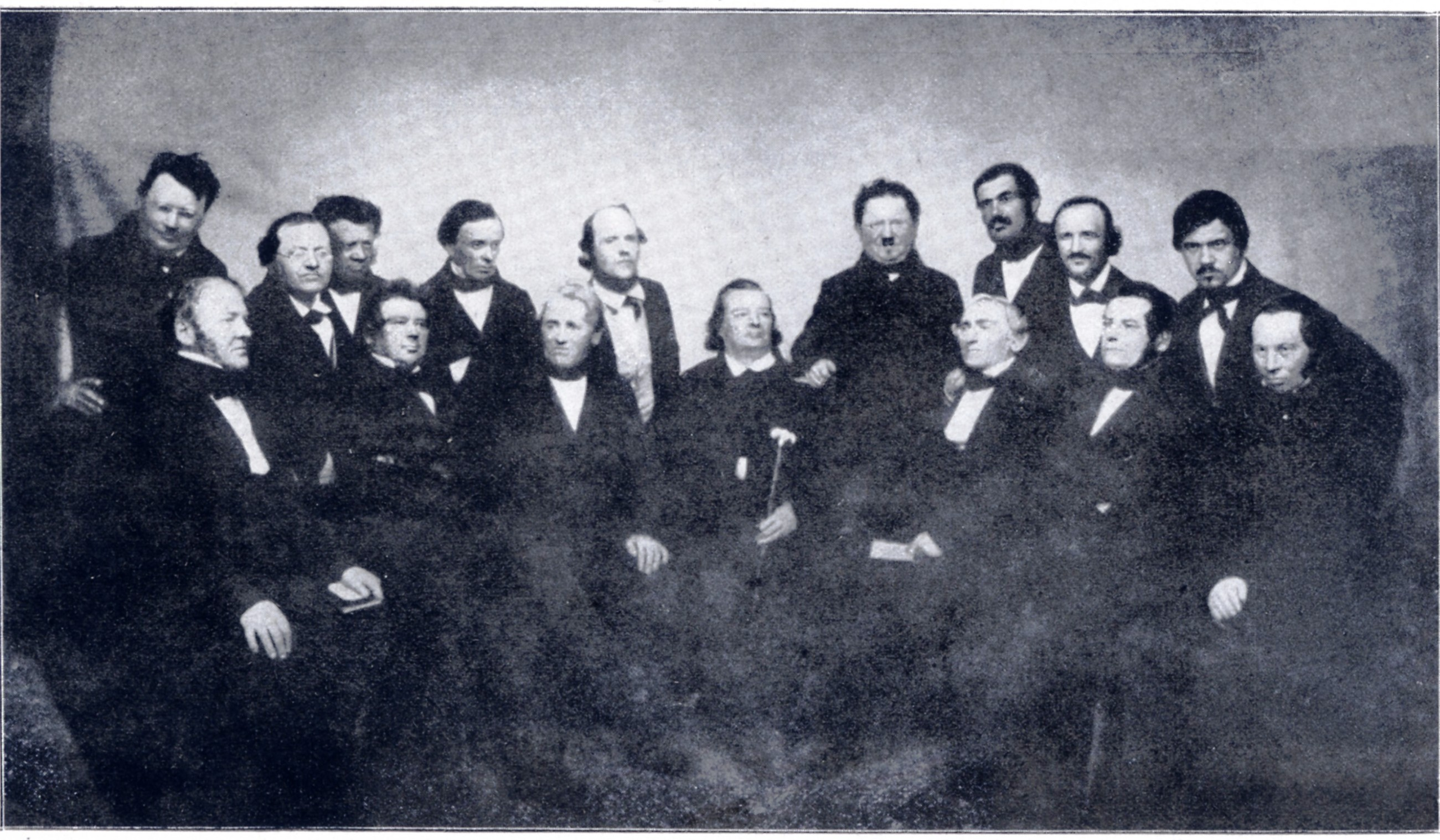 Die Heilbronner Gräßle-Gesellschaft, eine Honoratioren-Versammlung. In der Mitte Justinus Kerner, links unten der Heilbronner Stadtschultheiß Heinrich Titot. Foto von 1855.